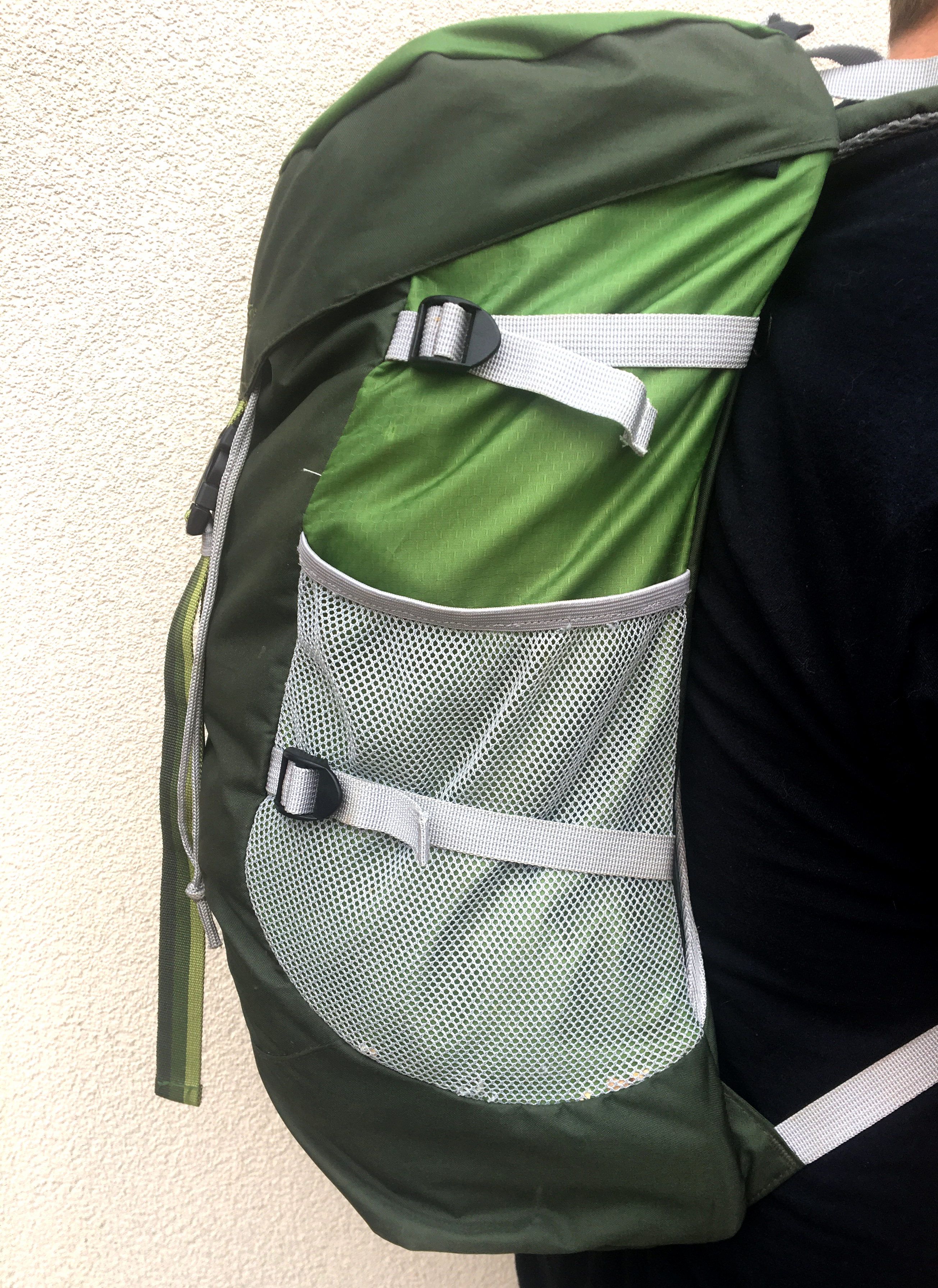 Bei Outdoor Geek. dreht sich alles – wie der Name schon sagt – um das Thema Outdoor: Camping, Survival, Jagd, und vieles mehr.